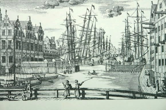 Zielony Most w Gdańsku, w drugiej połowie XVIII wieku.